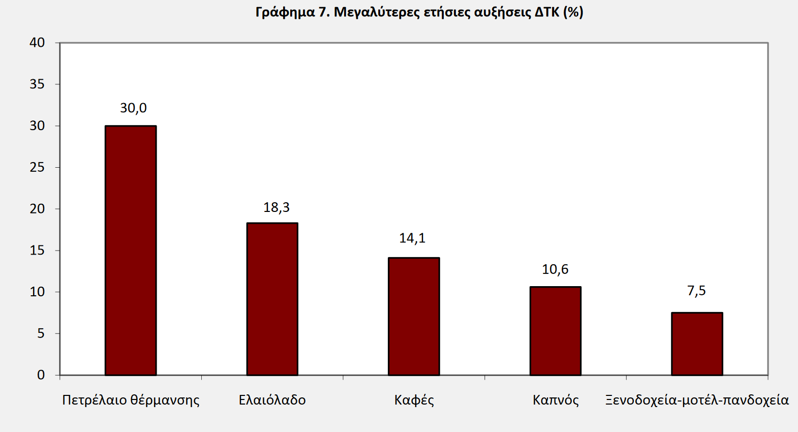 Μεγαλύτερες Αυξήσεις του ΔΤΚ(%) - 2017, Πηγή ΕΛΣΤΑΤ